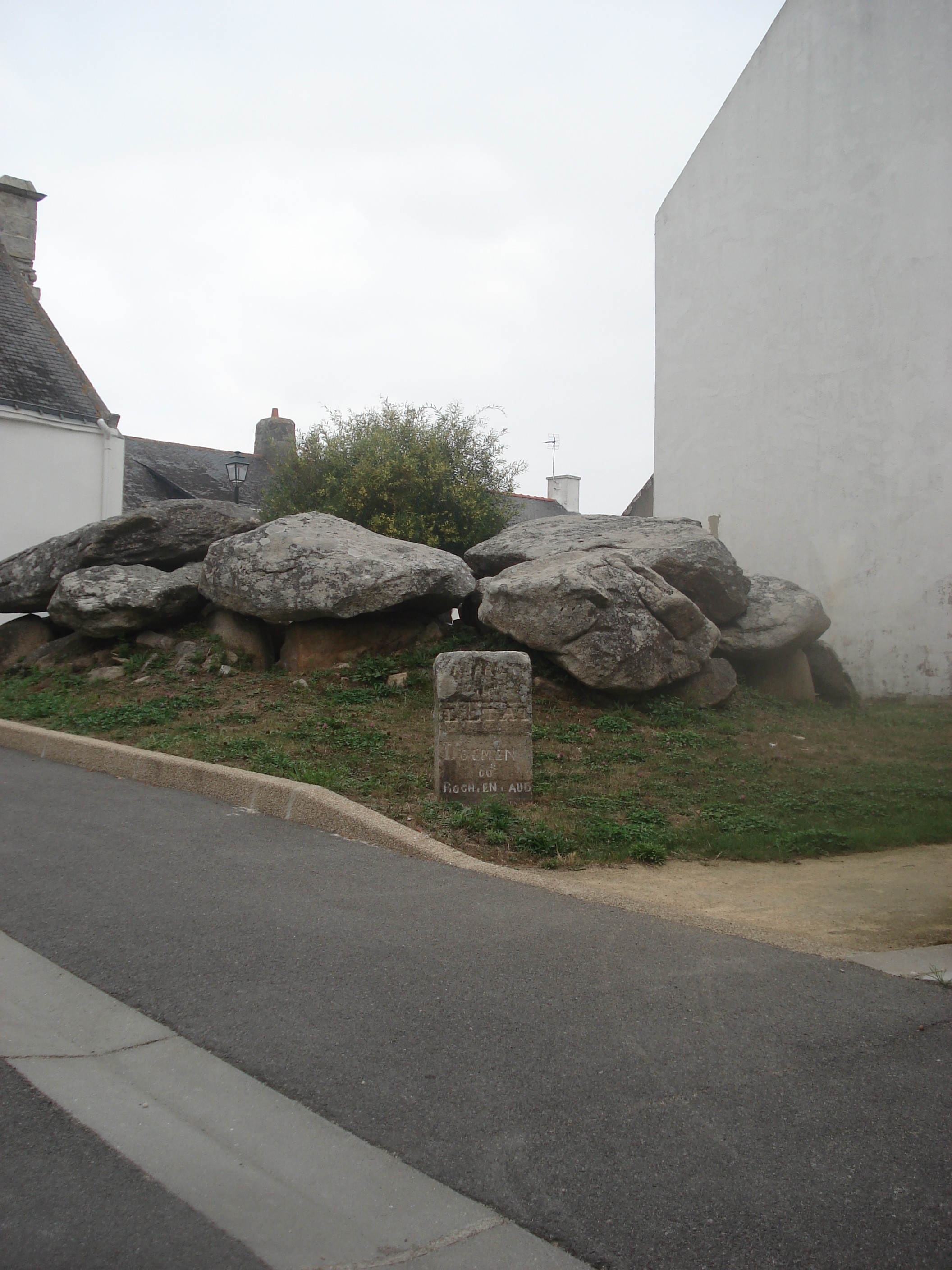 Dolmen du Roch